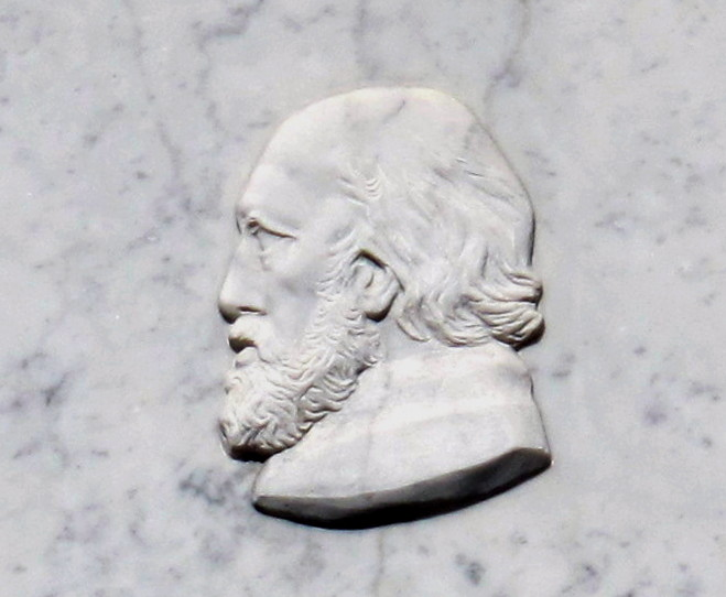 Busto in bassorilievo di Robert Davidsohn